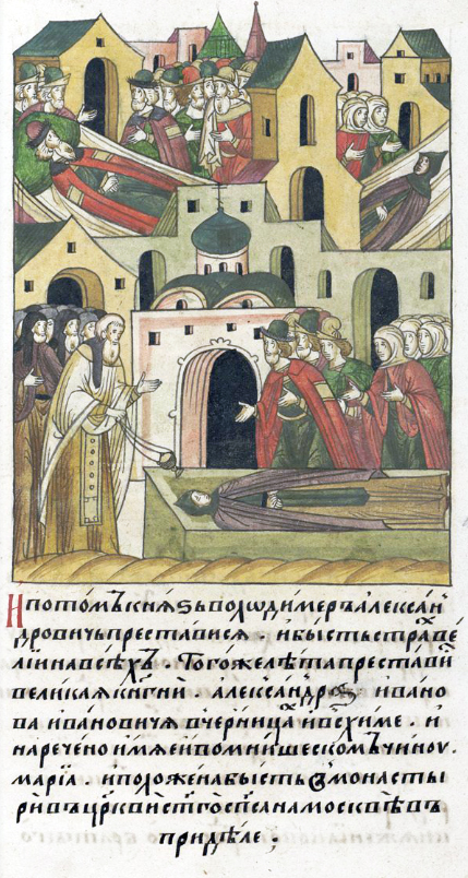 ЛИЦЕВОЙ ЛЕТОПИСНЫЙ СВОД И потом преставился князь Владимир Александрович, великий страх охватил всех. В том же году преставилась великая княгиня Александра Иванова Ивановича, жившая в черницах и в схиме, в монашеском чине имя ей было наречено Мария, и похоронена была она в монастыре в пределе церкви святого Спаса в Москве. Владимир Александрович - сын Александра Михайловича Тверского, место княжения не ясно